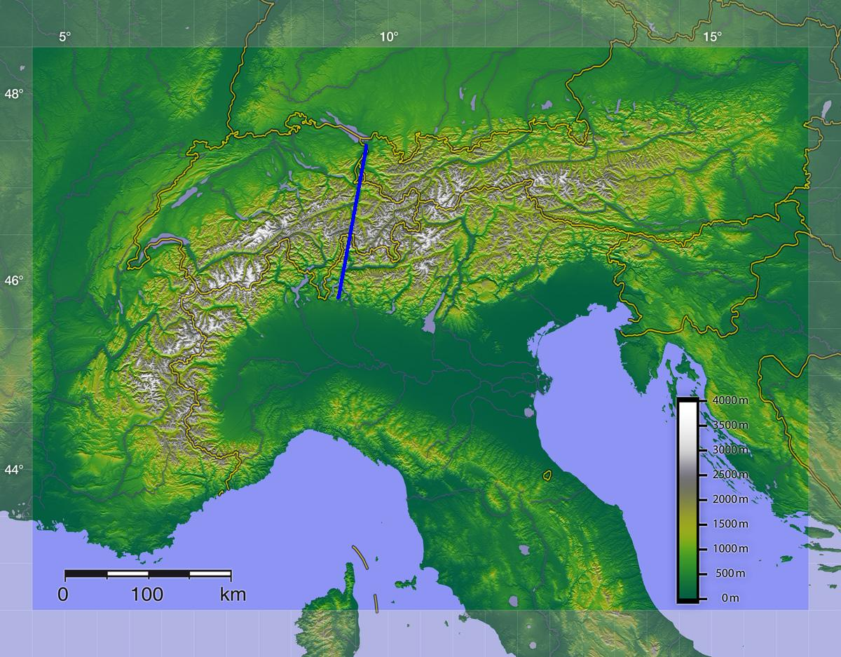 Разделение Альп на Западные и Восточные